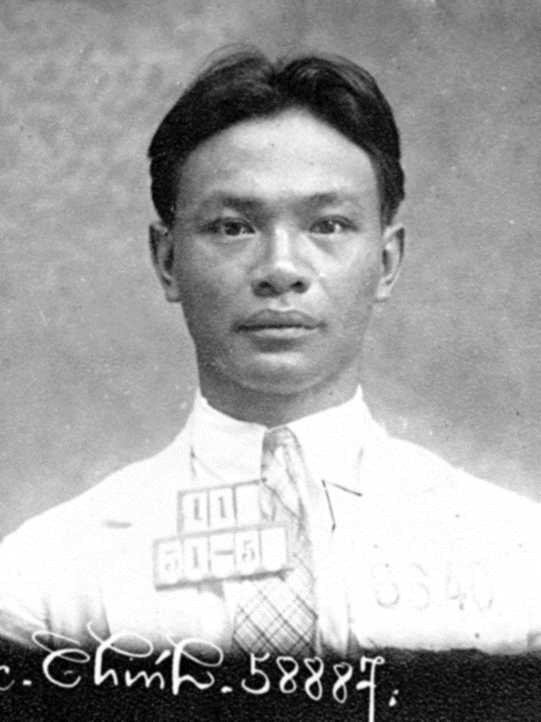 Chân dung ông Phó Đức Chính khi bị giam tại pha Hỏa Lò, 1930.